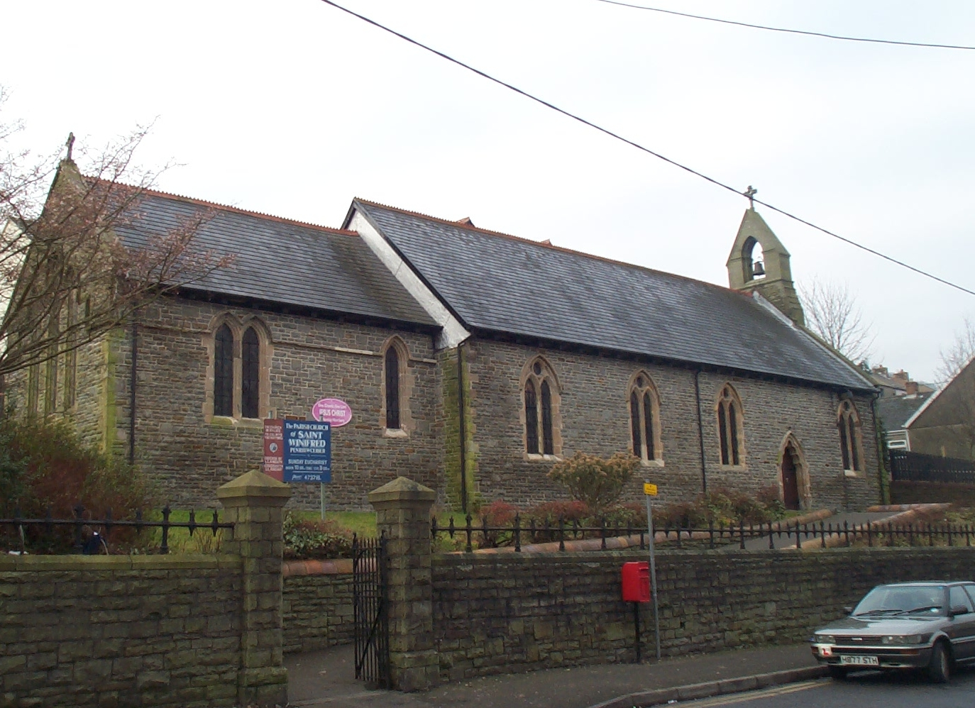 St Winifred's Church, Penrhiwceiber, Rhondda Cynon Taf, Wales.